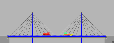 Schrägseilbrücke Fächerförmig